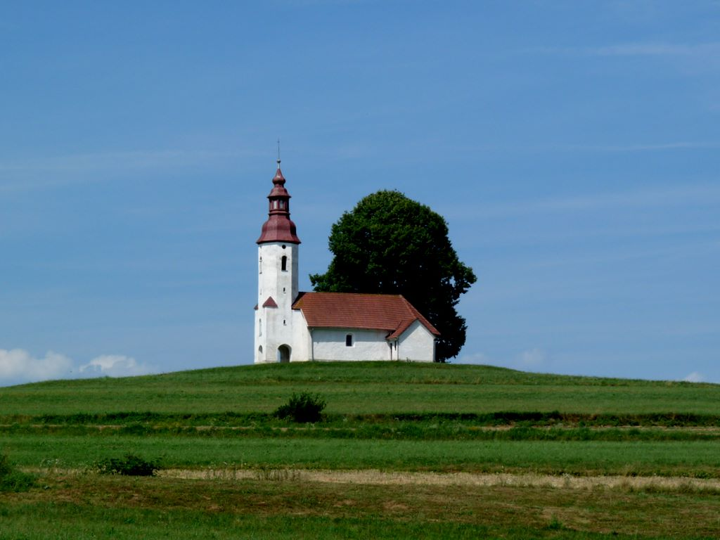 Sv. Nikolaj v Puščavi pri Mokronogu